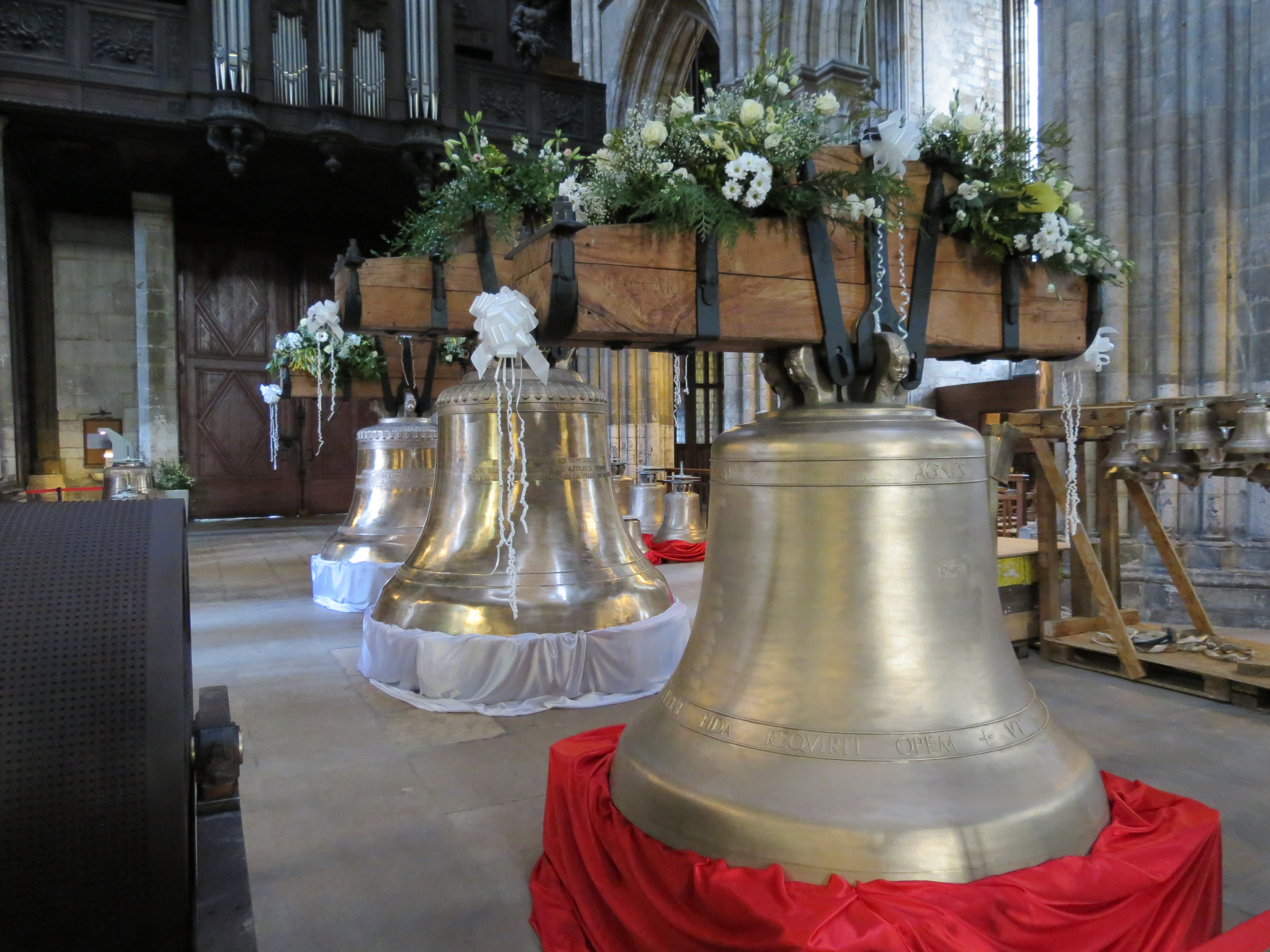 Cloches du carillon de la cathédrale de Rouen.